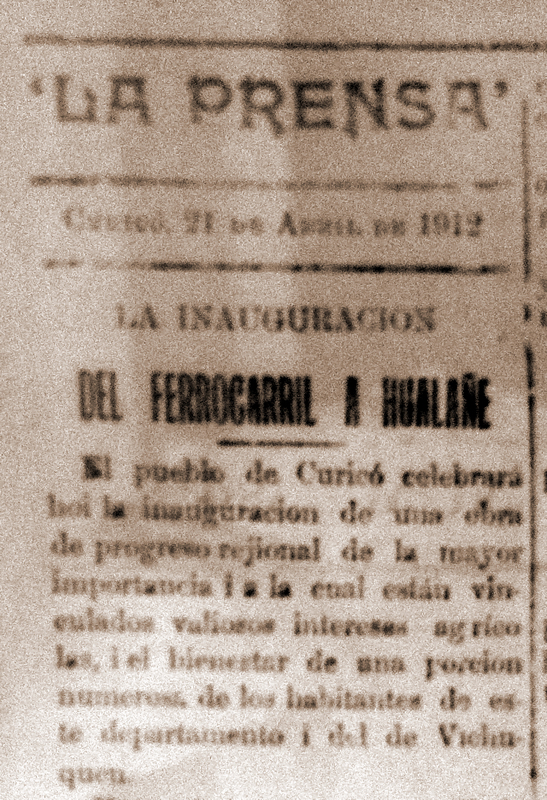 Inauguracion Ferrocarril Curicó a Hualañé